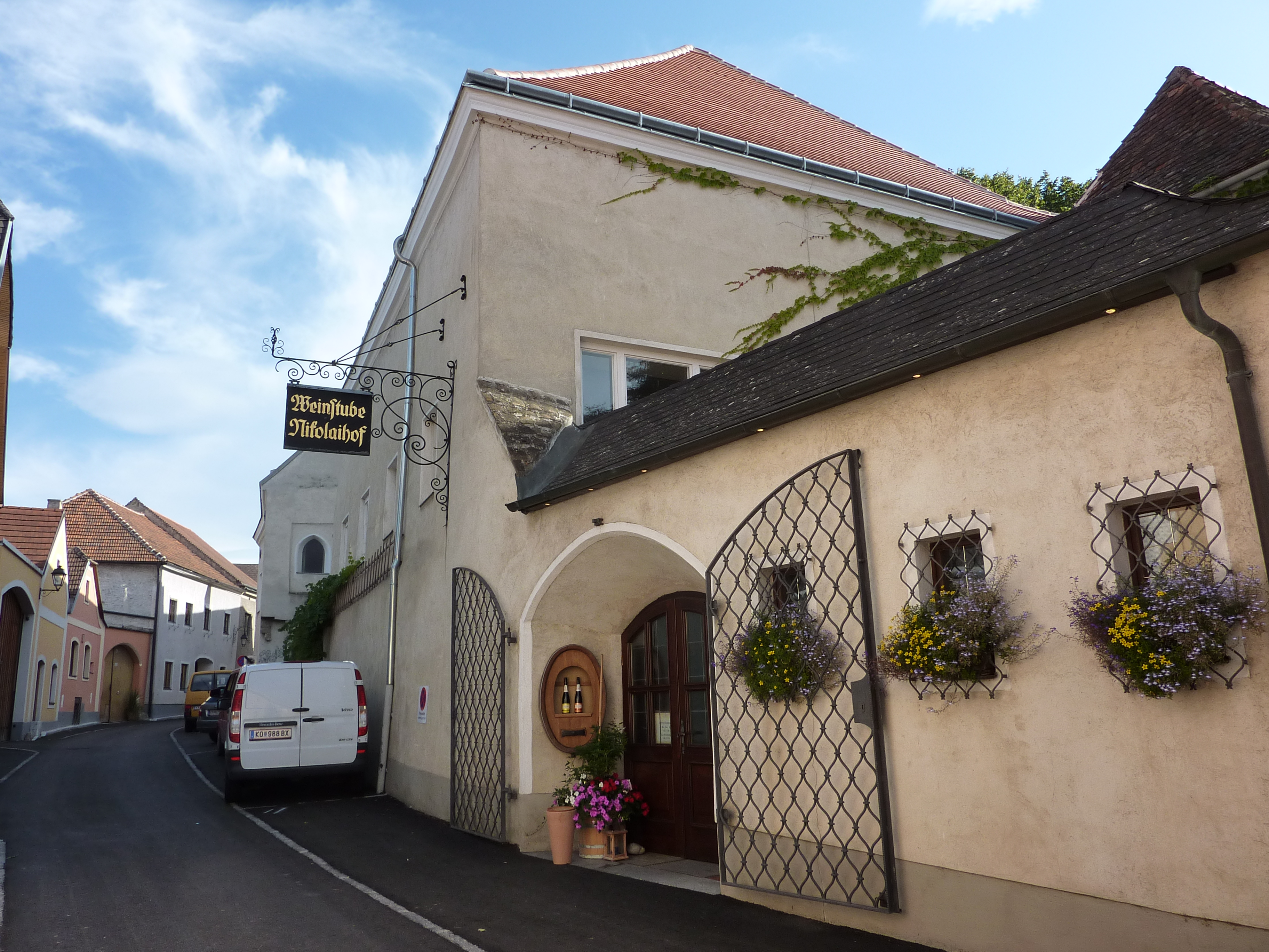 Nikolaihof, Mautern an der Donau in Niederösterreich